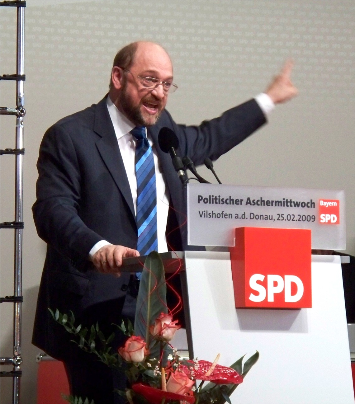 Martin Schulz beim Politischen Aschermittwoch in Vilshofen an der Donau 2009.